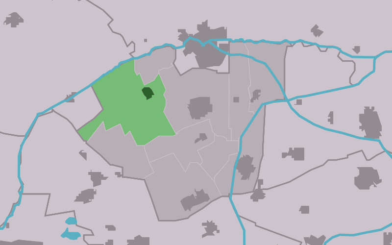 Kaartsje fan himrik fan Rinsumageast